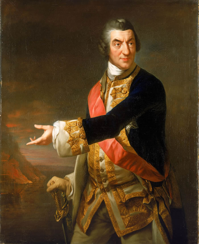 Gemälde von Richard Brompton: Der britische Admiral Charles Saunders (~1715-1775)